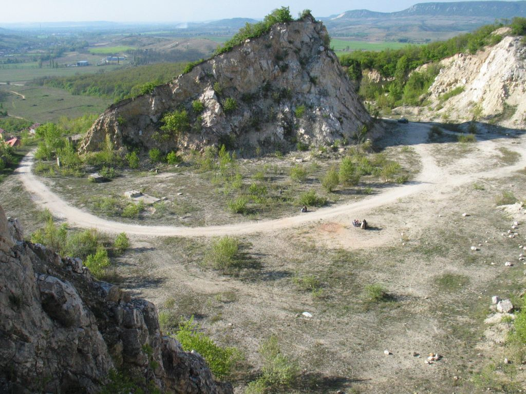 Pilisjászfalui mészkőbánya